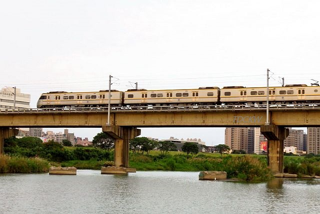 中文（台灣）: 臺灣鐵路管理局EMU800型電聯車通過頭前溪橋